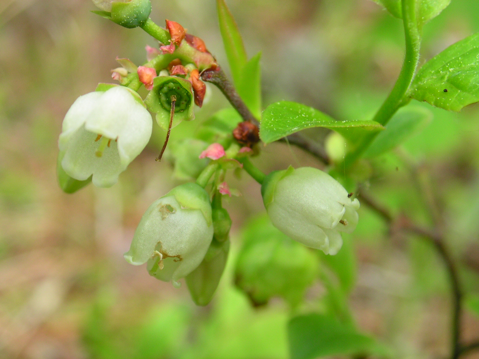 Vaccinium angustifolium 1